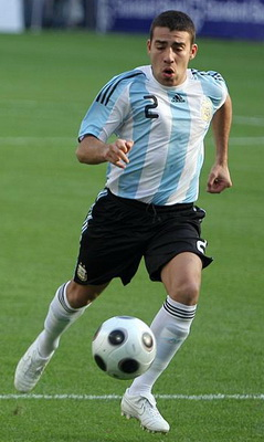 Nicolás Otamendi